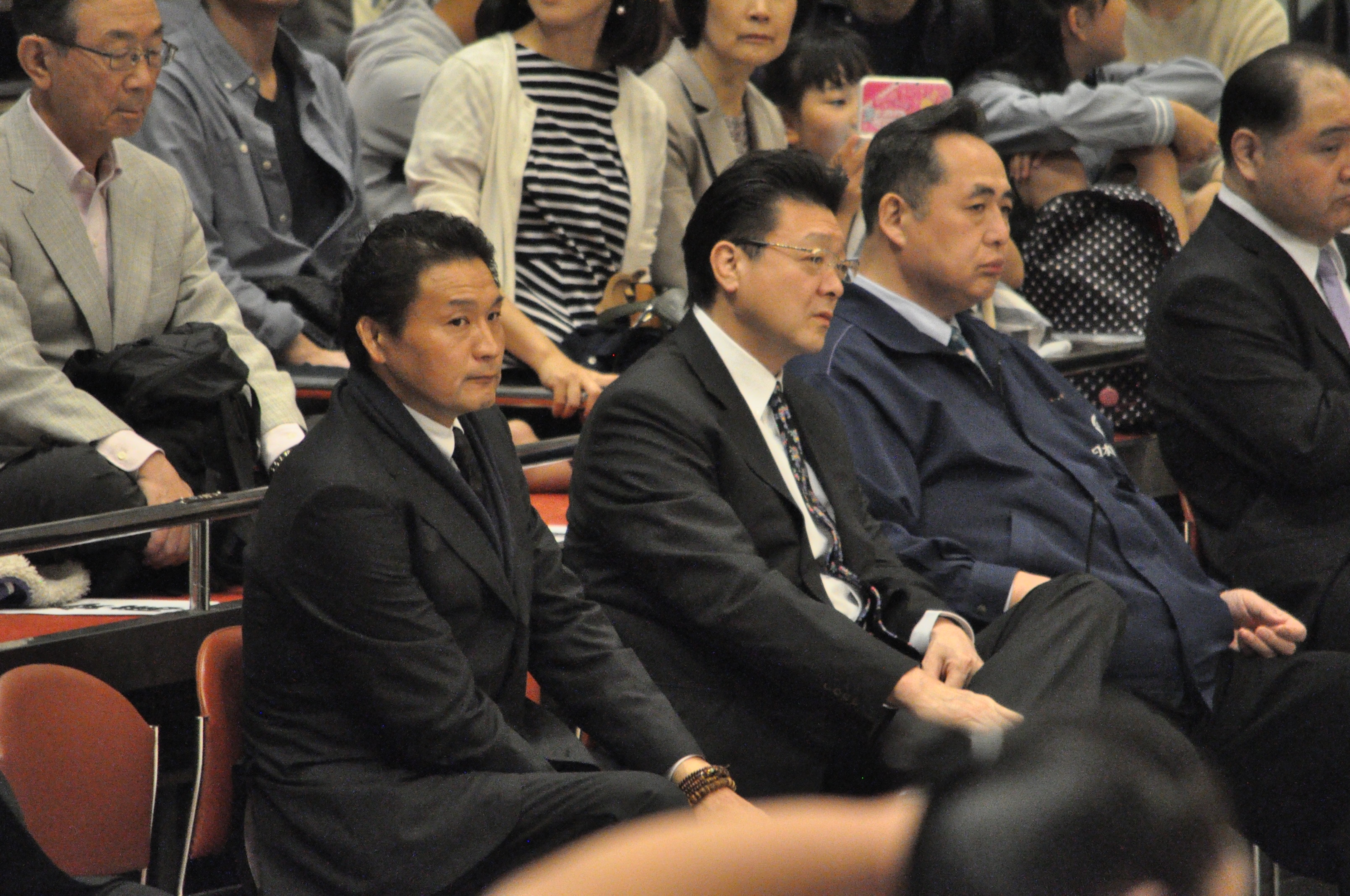 横綱稽古総見